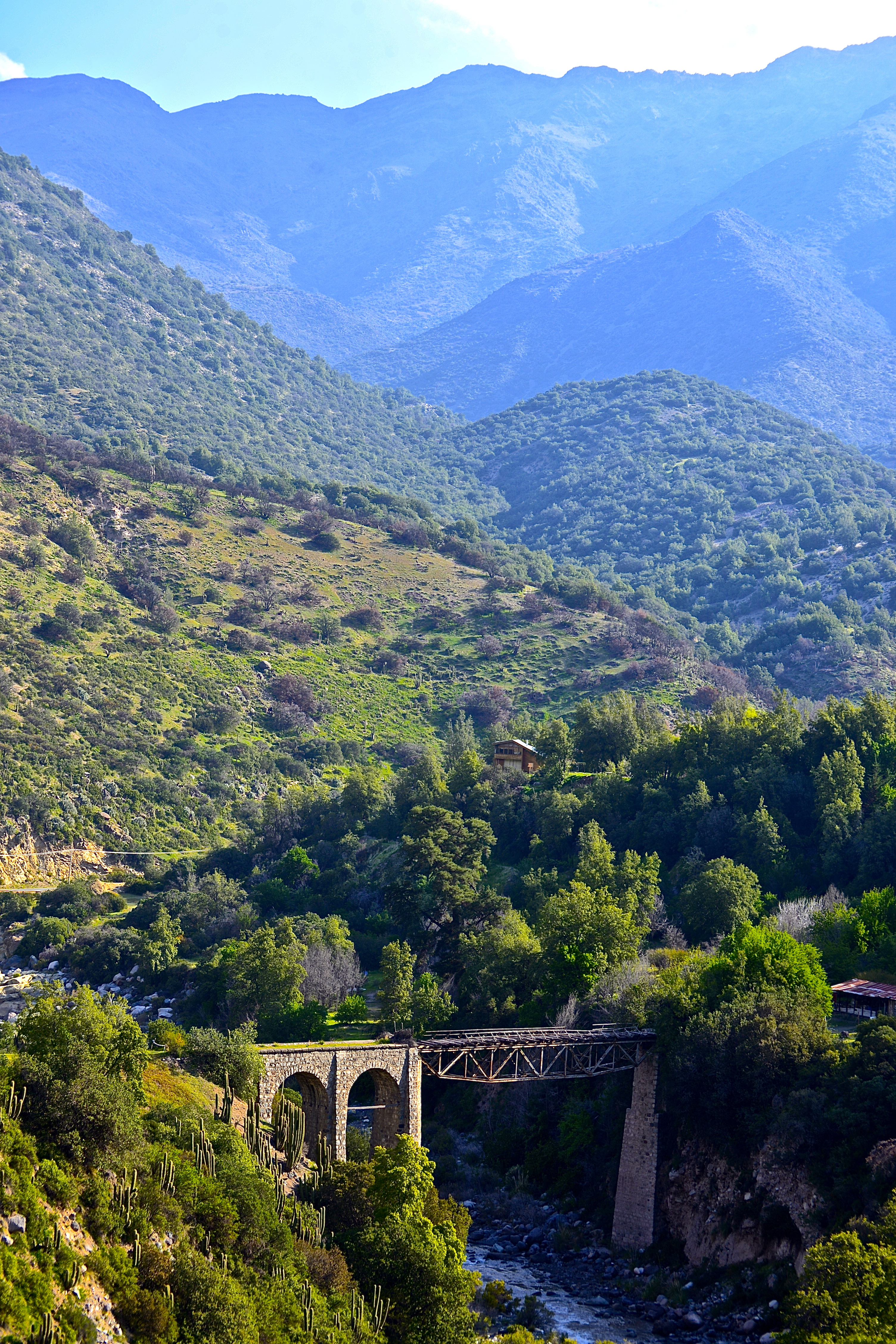 Construcciones existentes a lo largo del trazado del Ferrocarril de Puente Alto a El Volcán. This is a photo of a national monument in Chile: 881